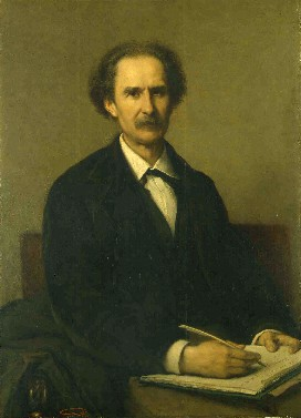 Portret van Émile Louis Victor de Laveleye (1822-1892) door Louis Gallait